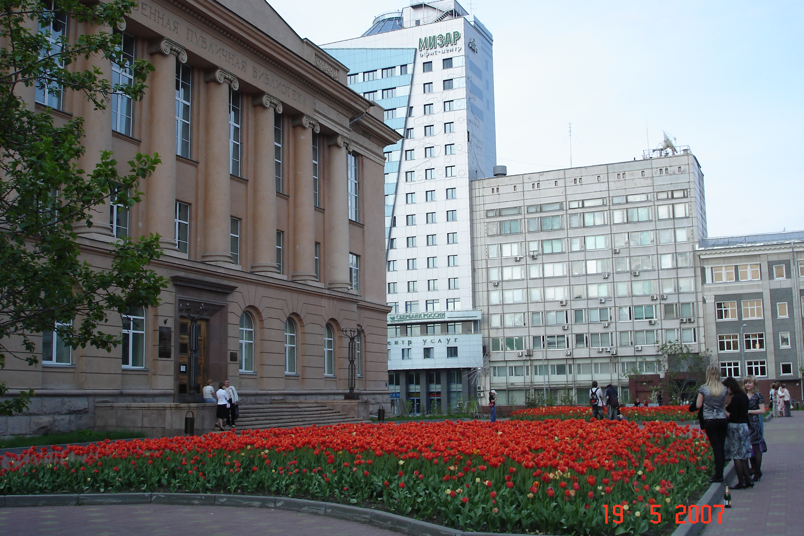 Публичная библиотека Челябинска